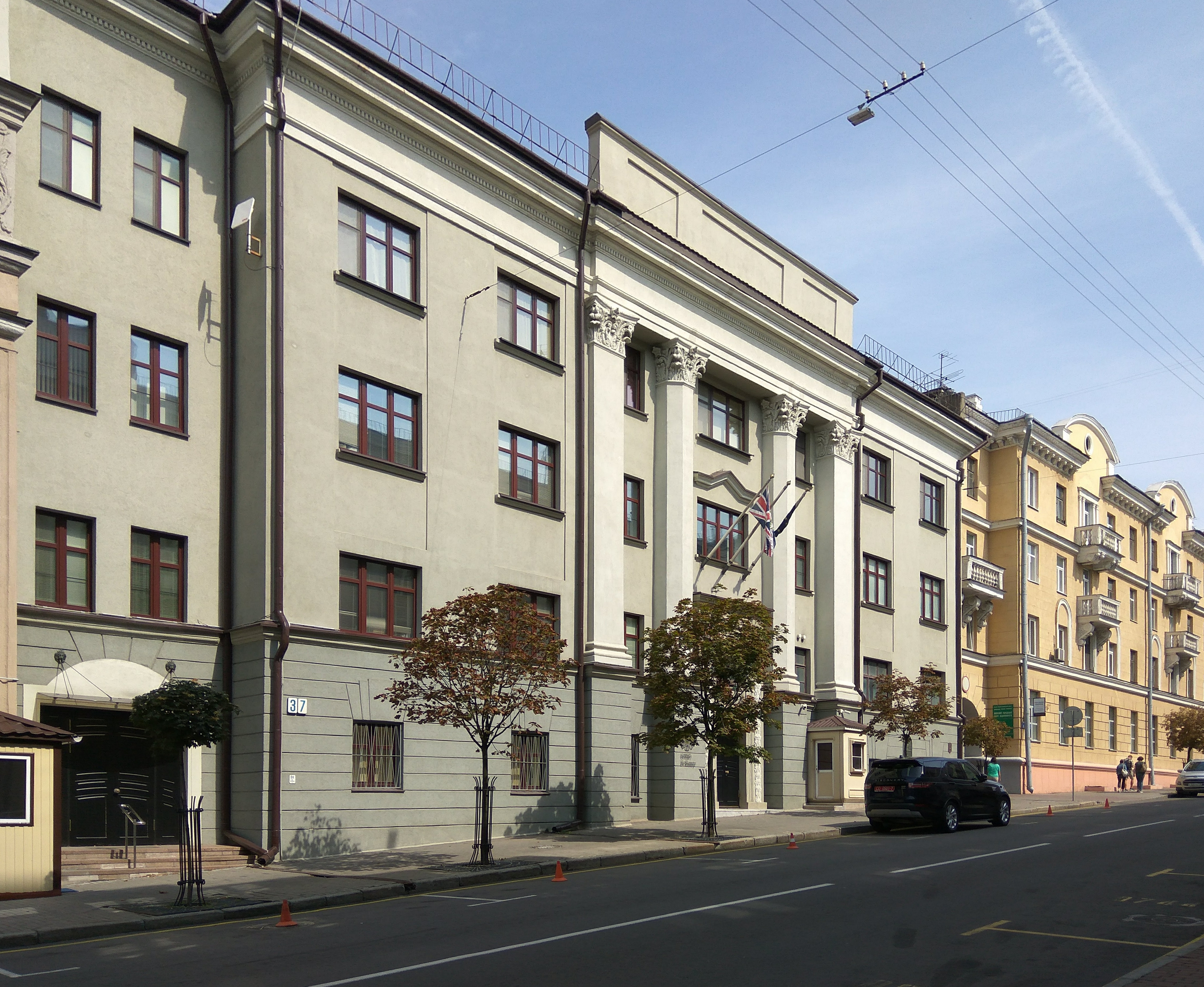 Мінск. Вуліца Карла Маркса